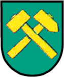 Herb Ptakowic (gmina Zbrosławice, powiat tarnogórski, województwo śląskie, Polska)